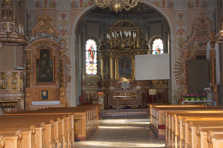 Wnętrze kościoła p.w. św. Mikołaja w Ludzisku